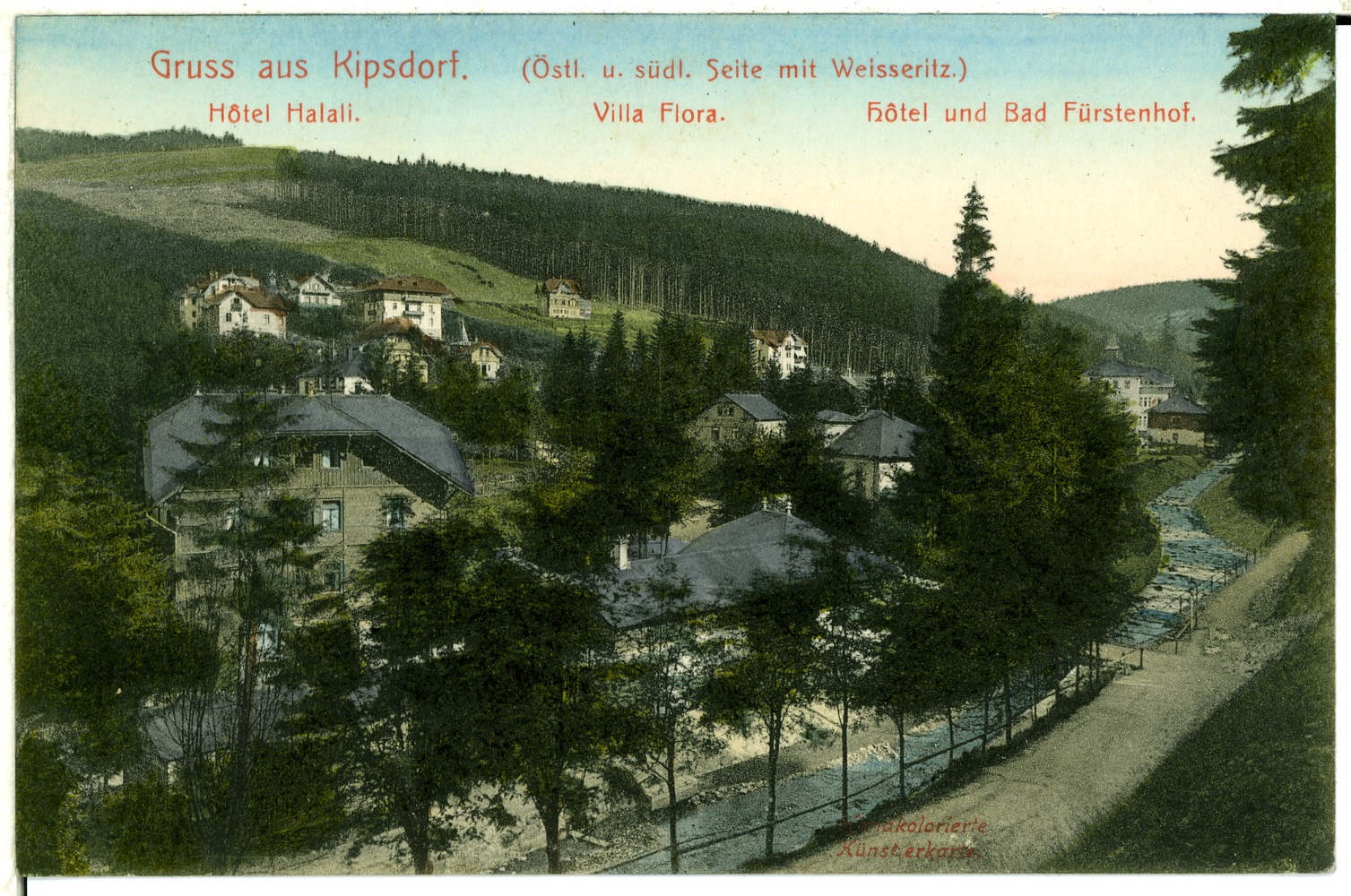 Kipsdorf; östliche und südliche Seite This postcard is from publisher Brück & Sohn in Meißen ( This postcard has a unique number 00188 and is available in a higher resolution at the publisher. This images was uploaded in a cooperation project between Wikipedians and the publisher.